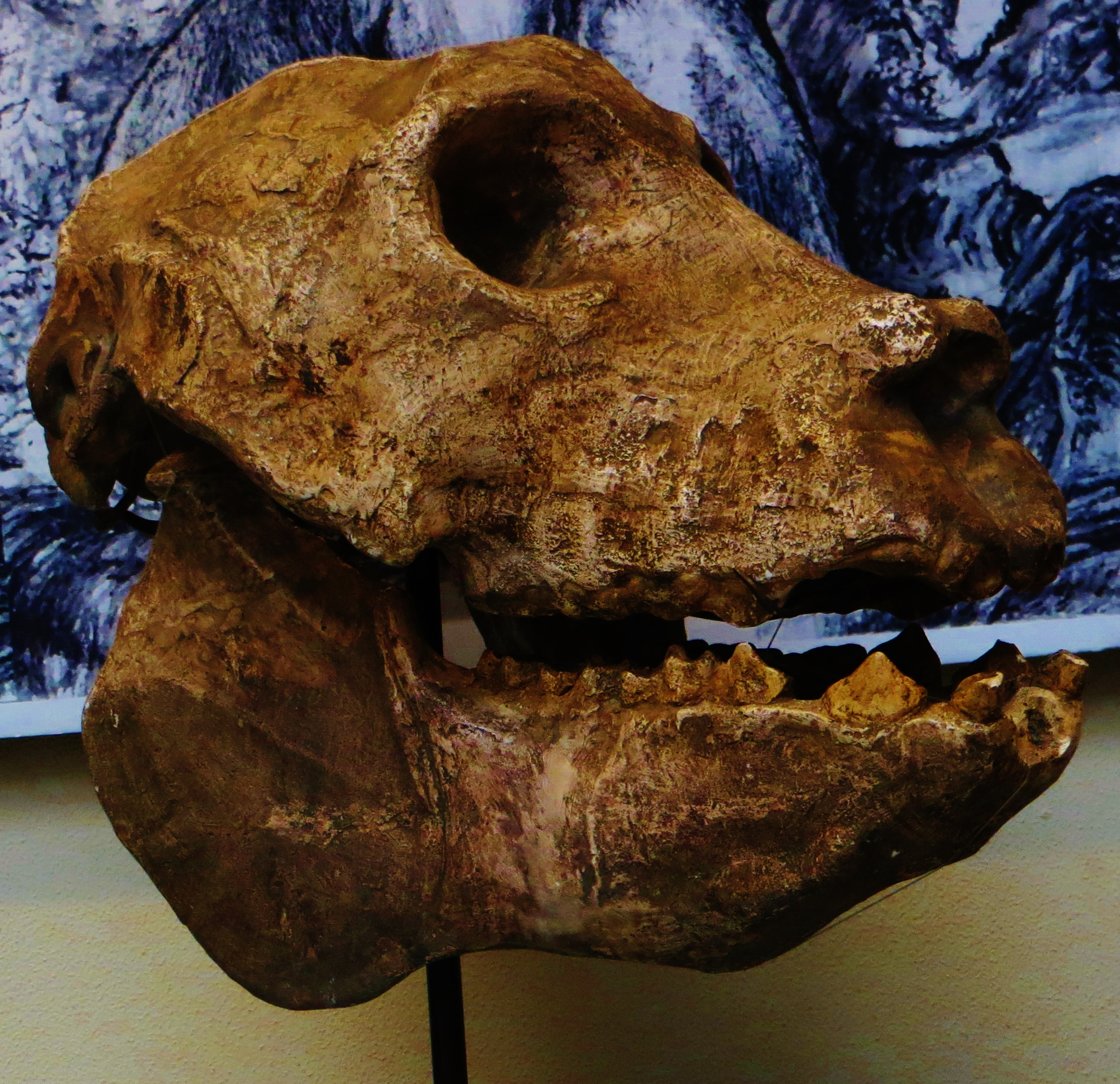 Fossil of Archaeoindris, an extinct mammal - Took the photo at Museum Histoire Naturelle, Paris